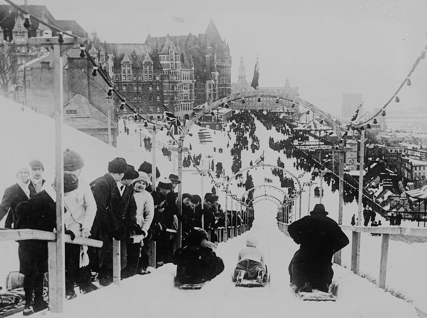 Glissade sur la terrasse Dufferin à Québec près du Château Frontenac (entre 1900 et 1925).